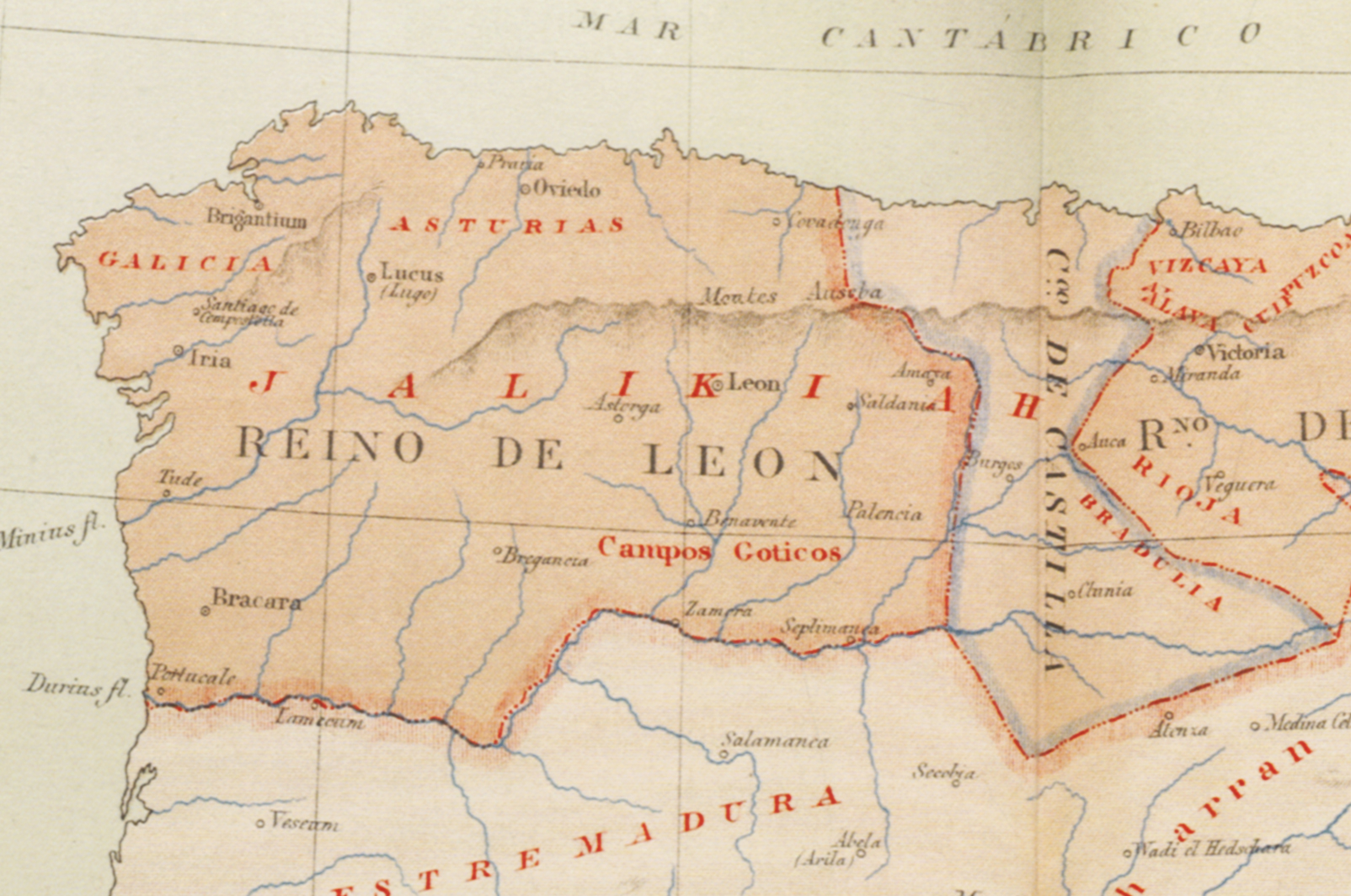 Detalle cartográfico do noroeste penínsular onde se aprecia en vermello o nome de "Jalikiah", e en negro o resultado da traducción dese termo polo autor Modesto Lafuente; "reino de León"